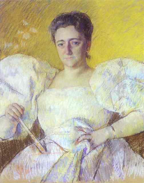 Portrait von Louisine W. Havemeyer